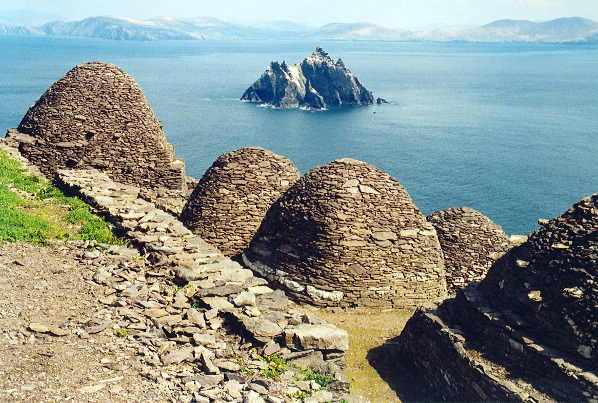 Skellig Michael, beehive cells and Small Skellig